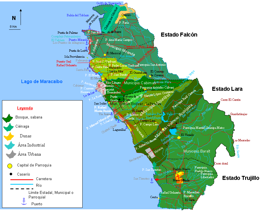 Mapa de la Costa Oriental del Lago una Subregión del Estado Zulia, Venezuela